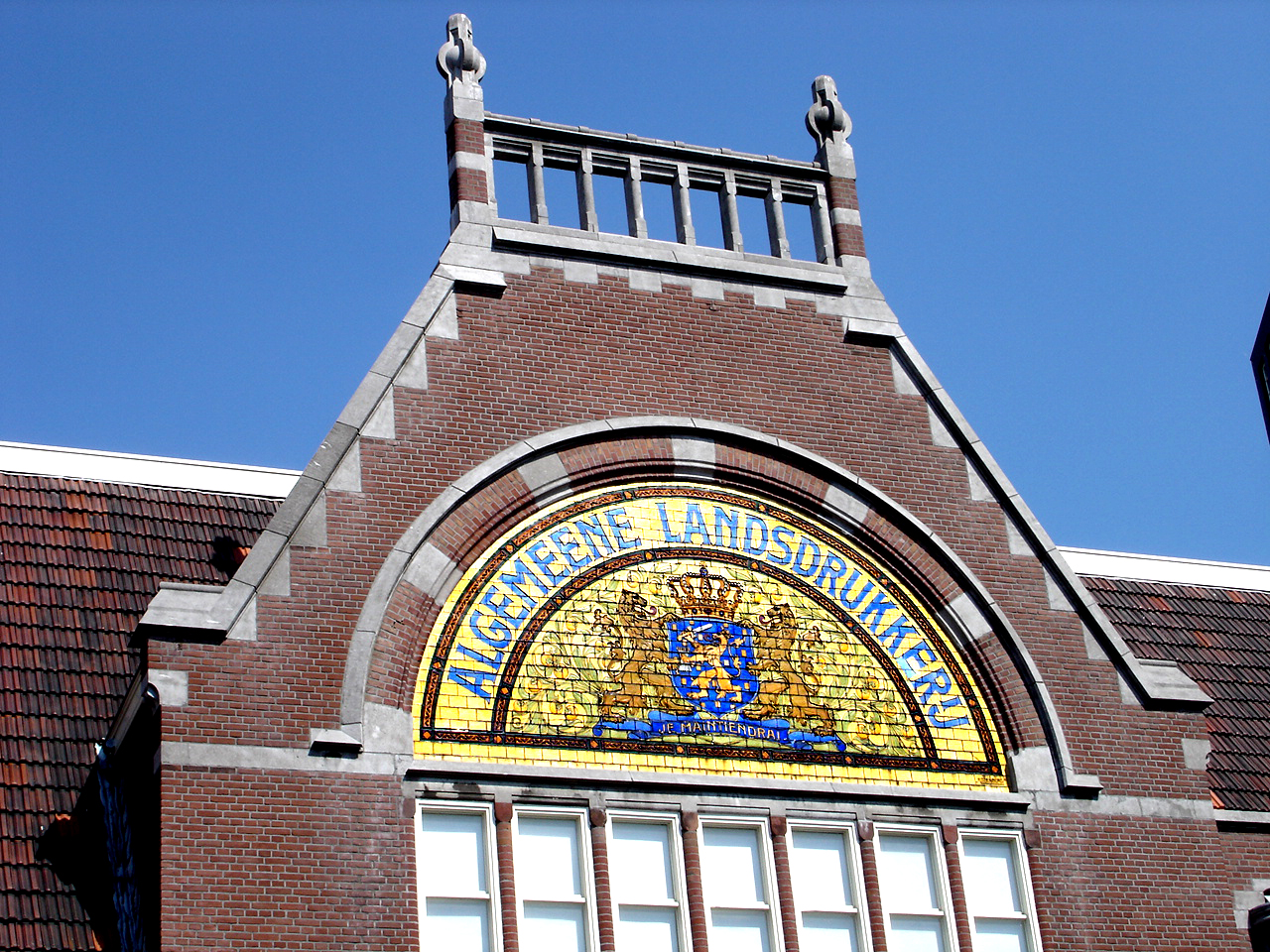 Zelfgemaakte media